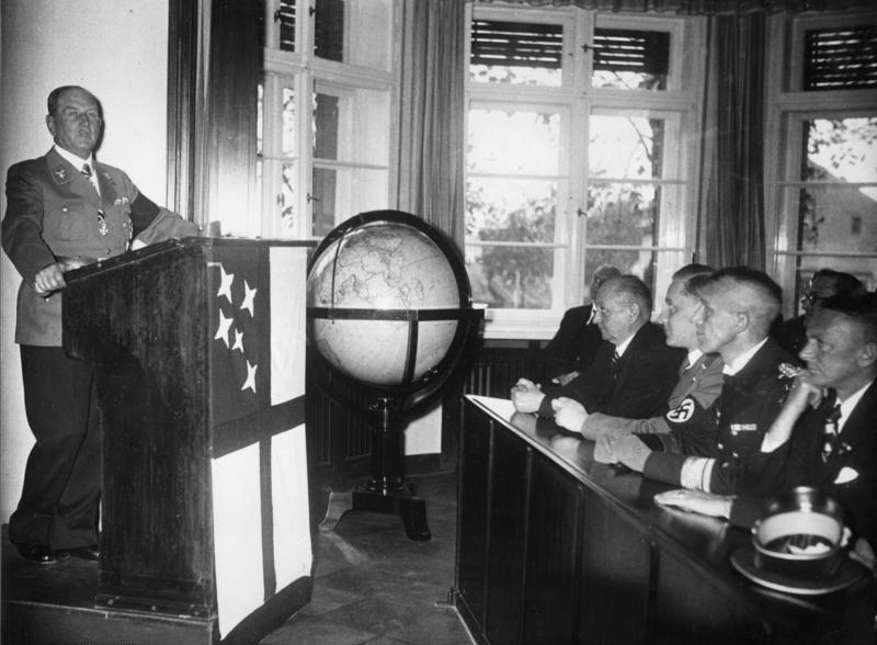 Kolonialpolitisches Schulungshaus Reichsstatthalter Franz Ritter von Epp eröffnet am 29.10.1938 das Kolonialpolitische Schulungshaus in Ladeburg-Bernau. UBz: Reichsleiter, Bundesführer General Ritter von Epp bei seiner Eröffnungsrede im Hörsaal. Im Vordergrund von r.n.l. Stabsamtsleiter Wenig, Konter-Admiral Fuchs und Reichsamtsleiter Scheidt. Abgebildete Personen: Epp, Franz von Ritter: Reichsstatthalter von Bayern, General, Heer, Deutschland Fuchs, Werner: Admiral, Ritterkreuz (RK), Marine, Deutschland